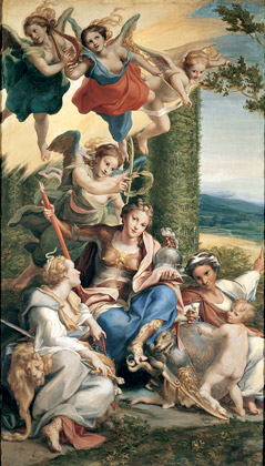 Antonio Allegri, known as Corregio (Correggio, circa 1489 - Correggio, 1534) Allegory of Virtues 1528-1530 Canvas; H. 1.48 m; W. 0.88 m Paris, Musée du Louvre, dép. des arts graphiques, Inv. 5926